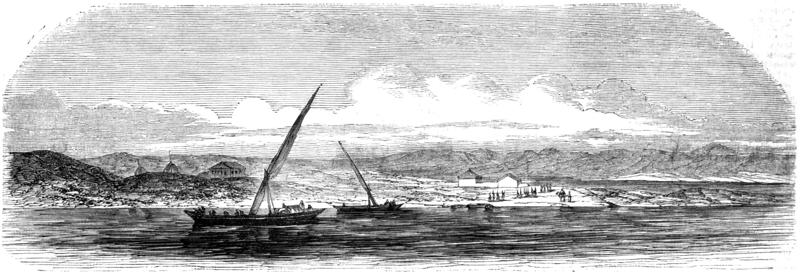 La Danube et la Muraille de Trajan à Tchernavoda